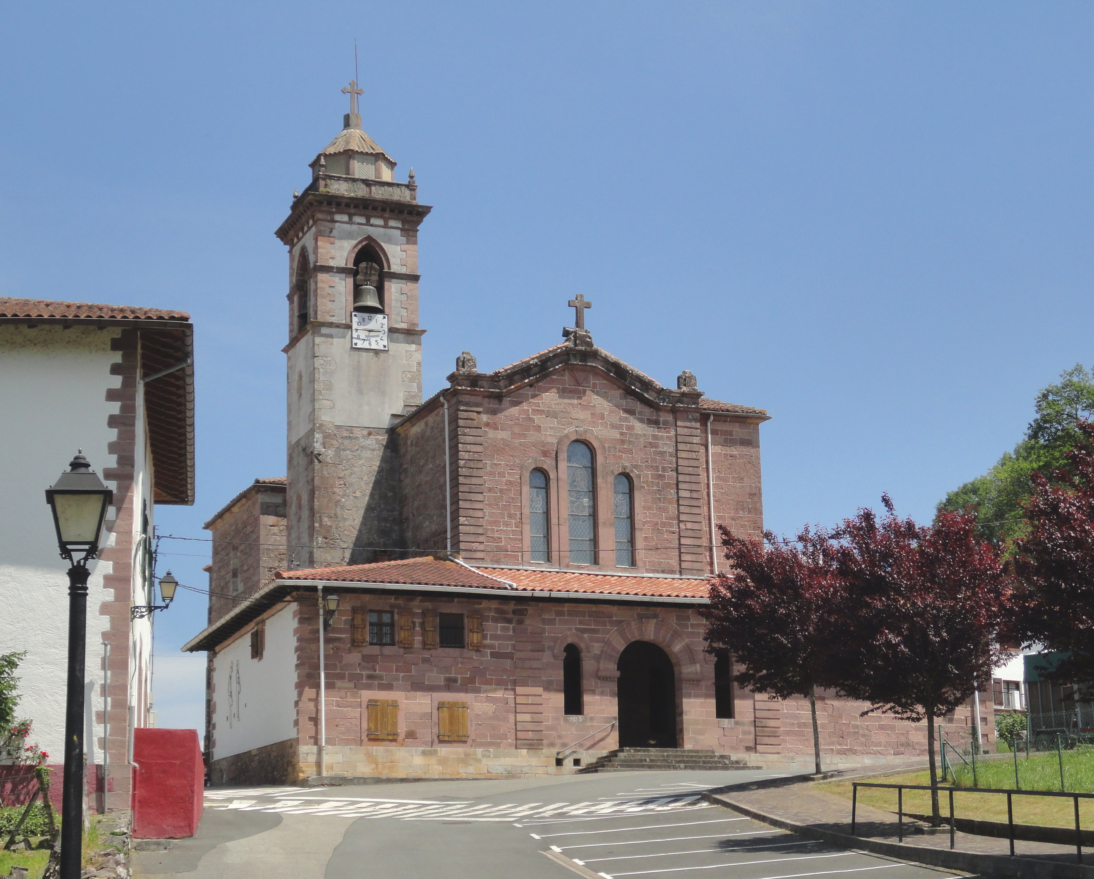 Asuncion eliza. Arraioz, Baztan